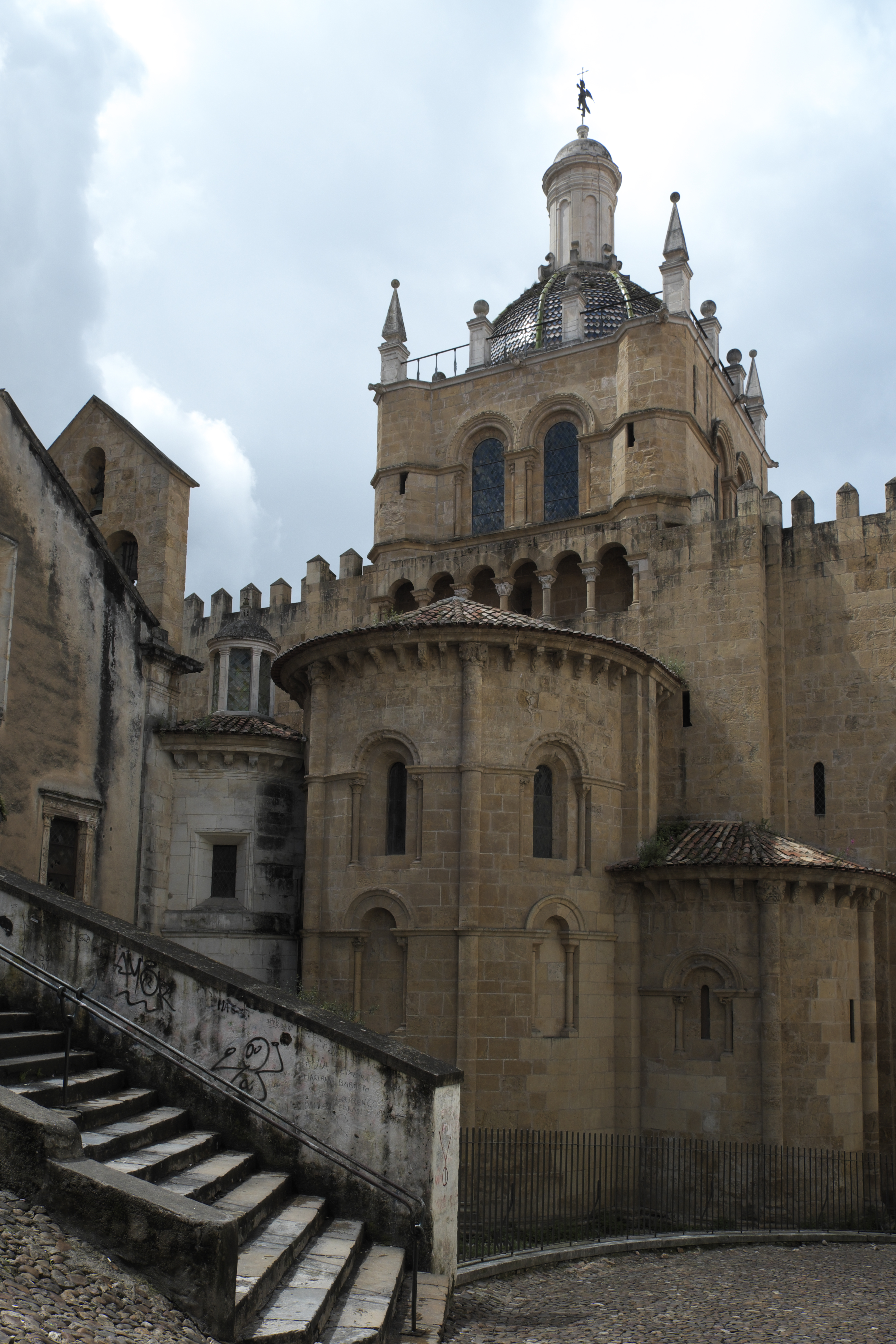 Alte Kathedrale Sé Velha in Coimbra in Portugal, Ansicht von Osten